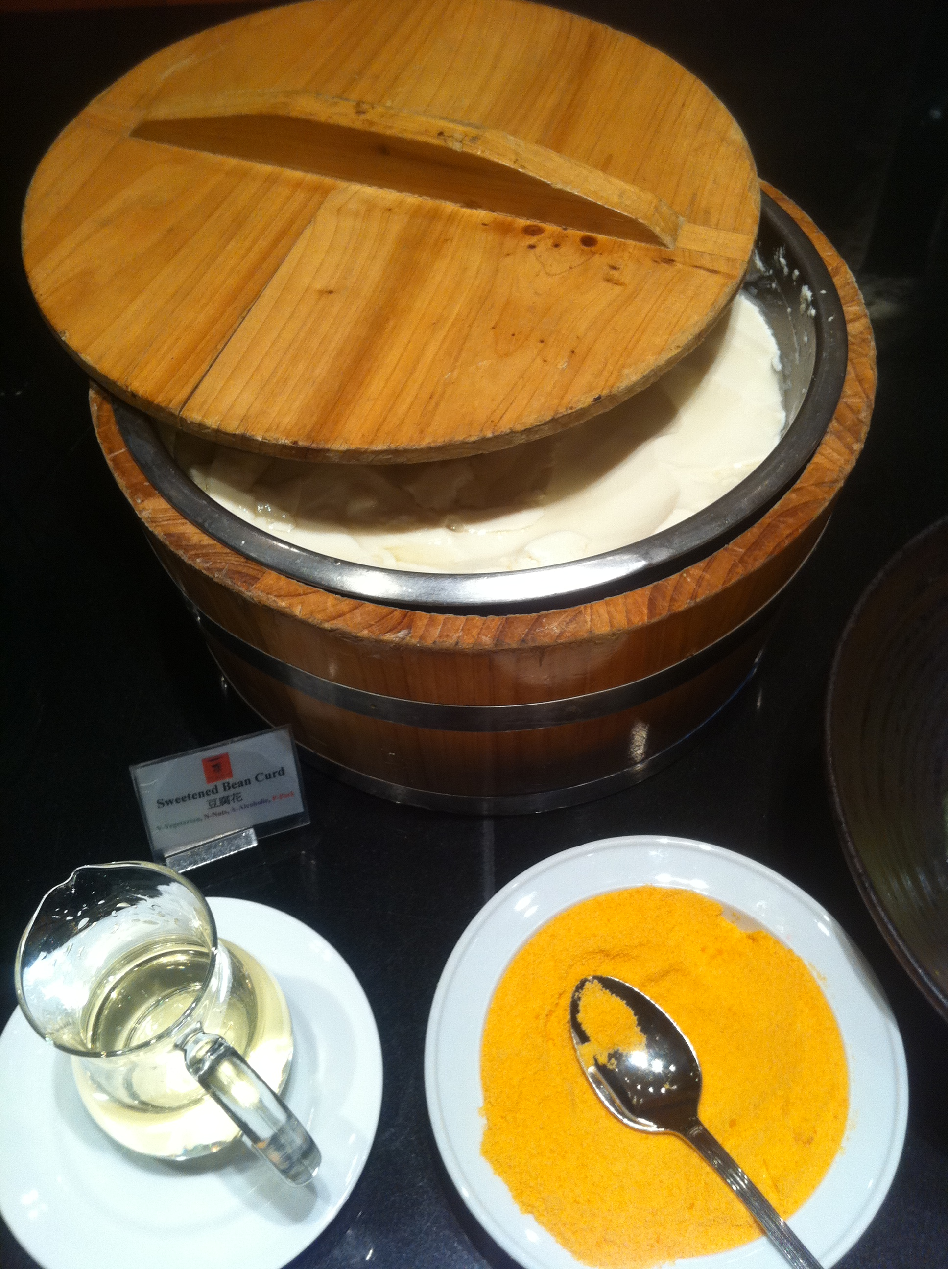 中文（香港）: 香港怡東酒店 自助餐 豆腐花